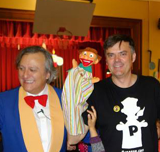 Peneque en USA